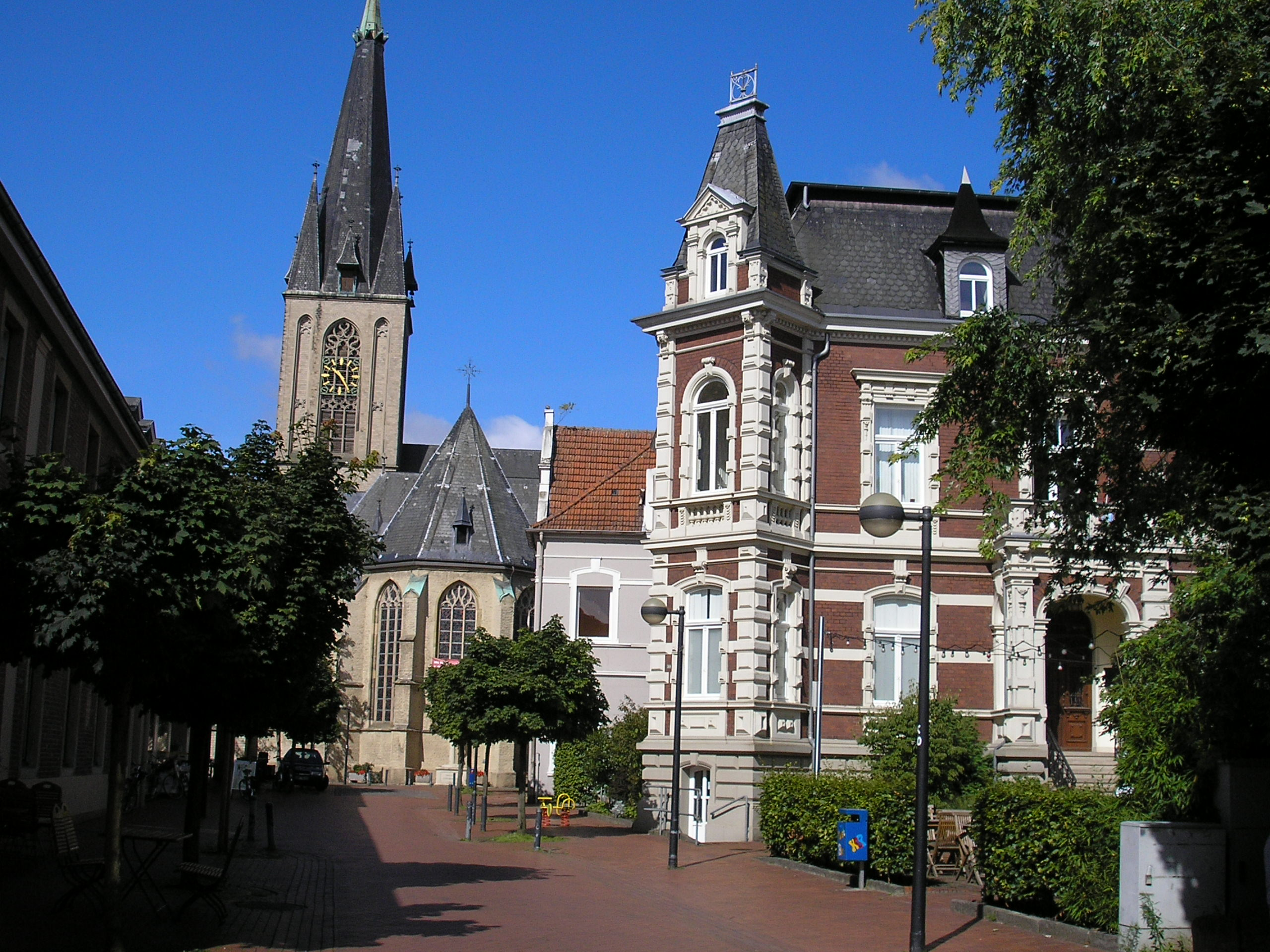 Gescher, St. Pankratrius